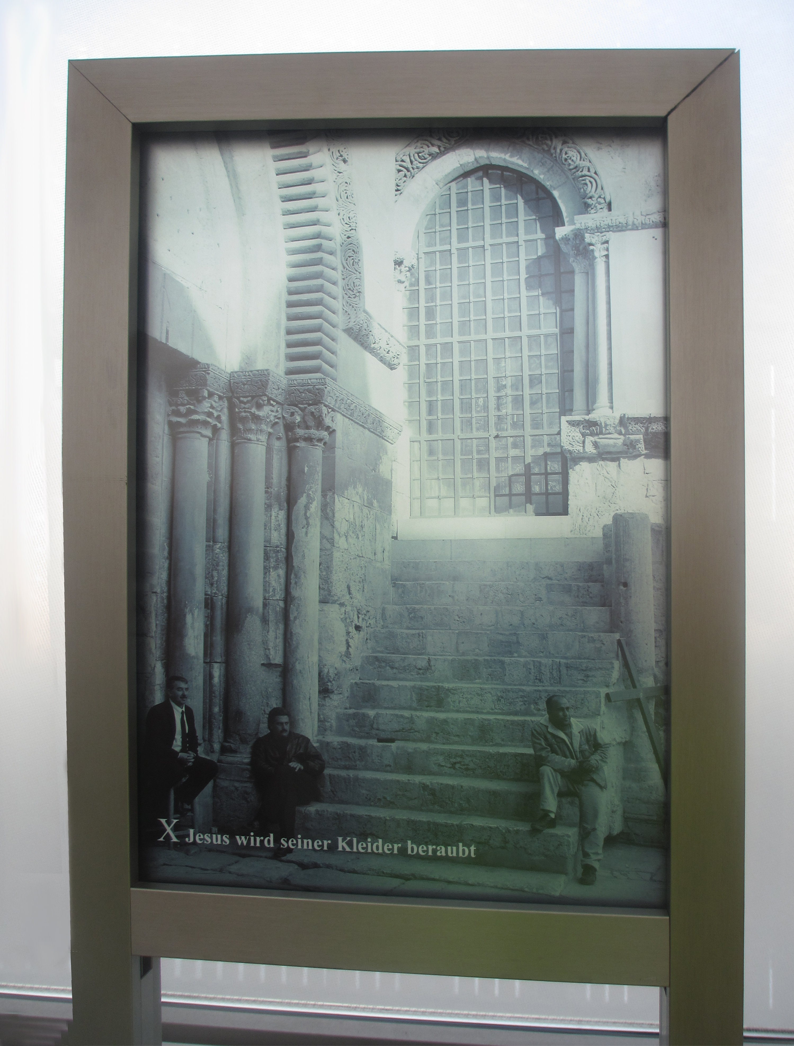 Kreuzweg des Künstlers Matthias Wähner. Die verschiedenen Stationen der Leiden Jesu werden durch Schwarzweiß-Fotografien der entsprechenden Stationen auf der Via Dolorosa in Jerusalem illustriert.